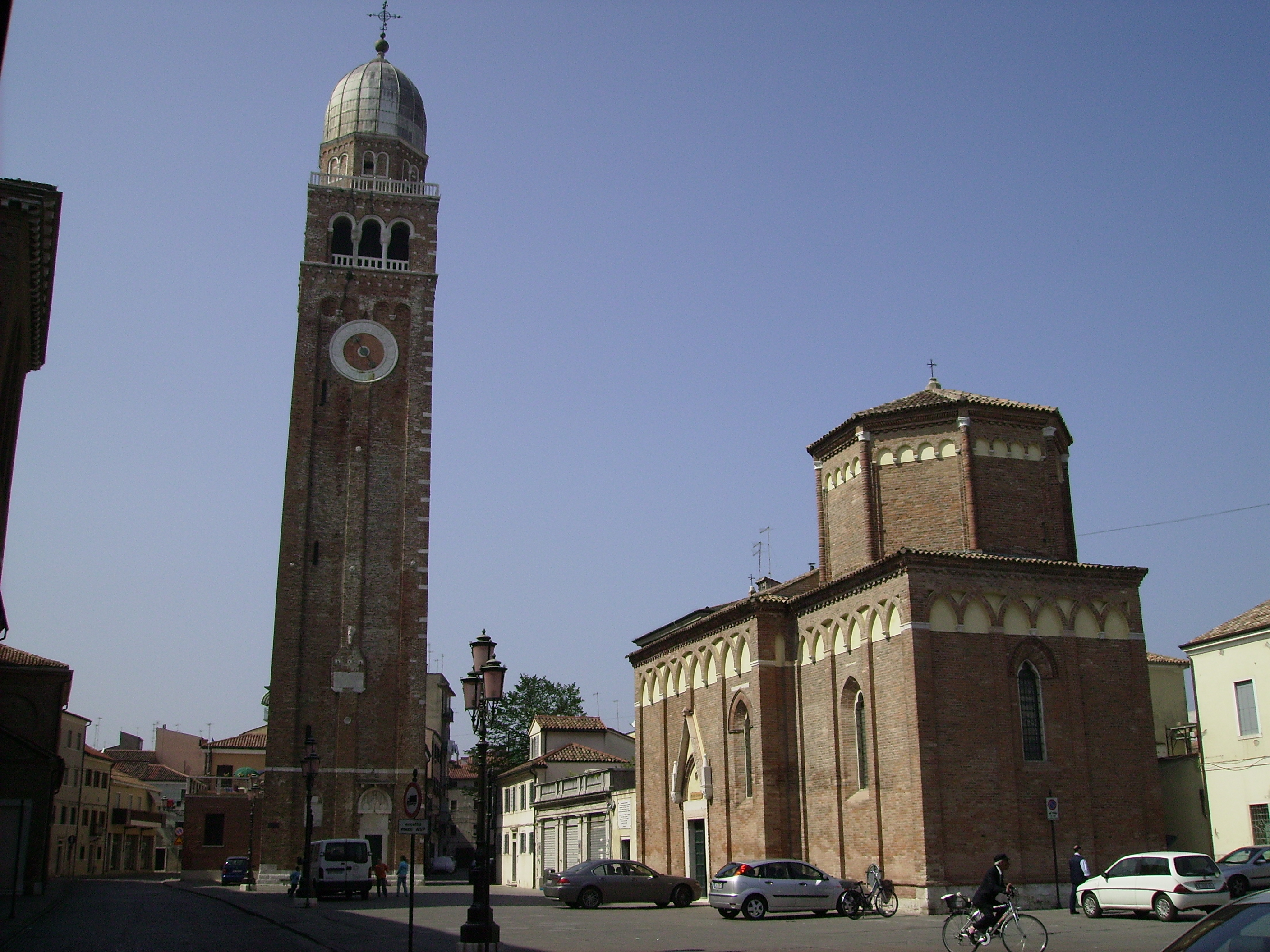 CHIOGGIA, C.po del Duomo